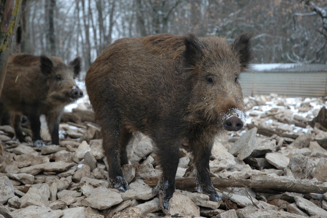 sangliers pris en photo dans le Doubs